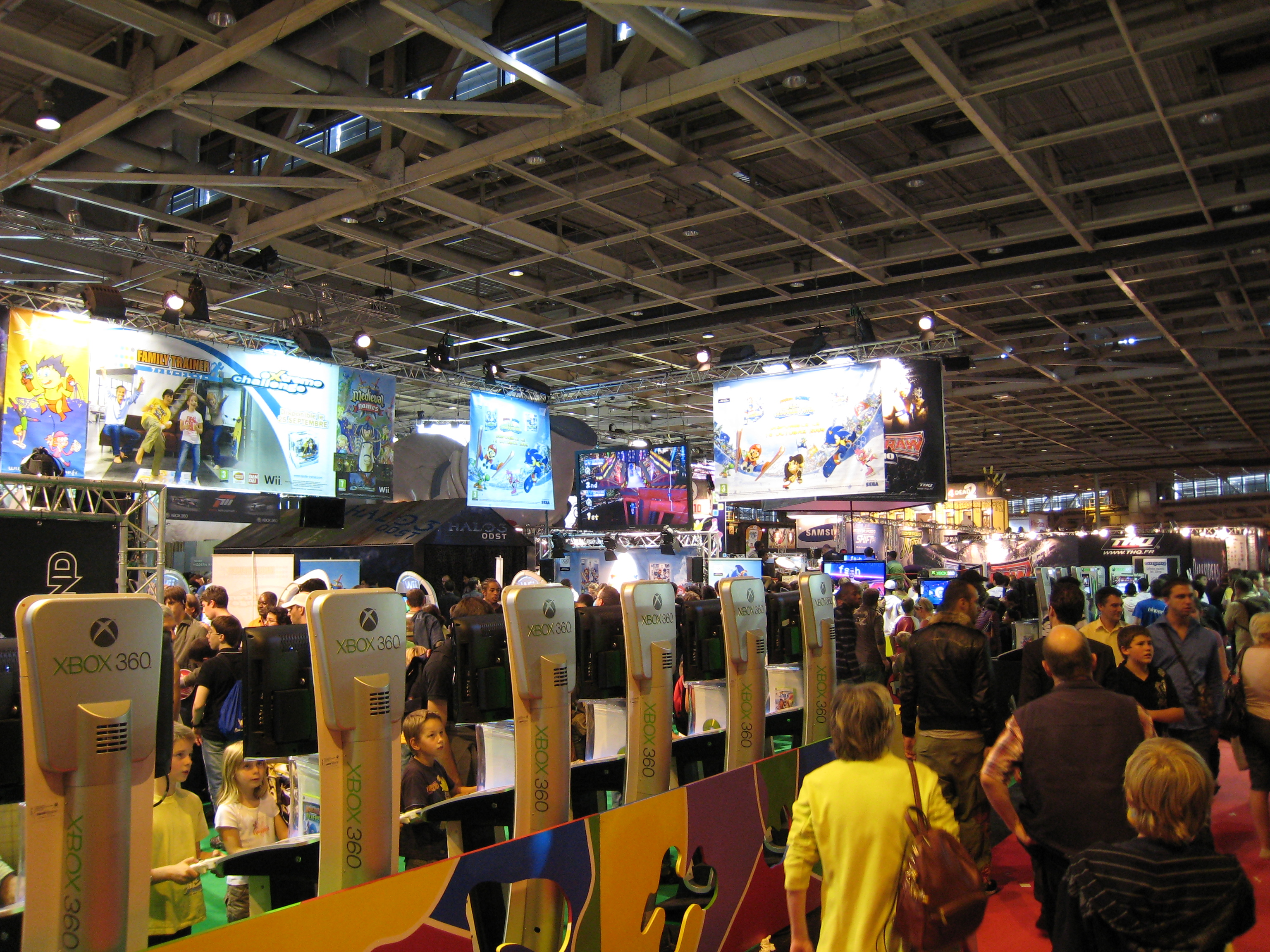 Festival du jeu vidéo 2009, Parc des expositions de la porte de Versailles, Paris.